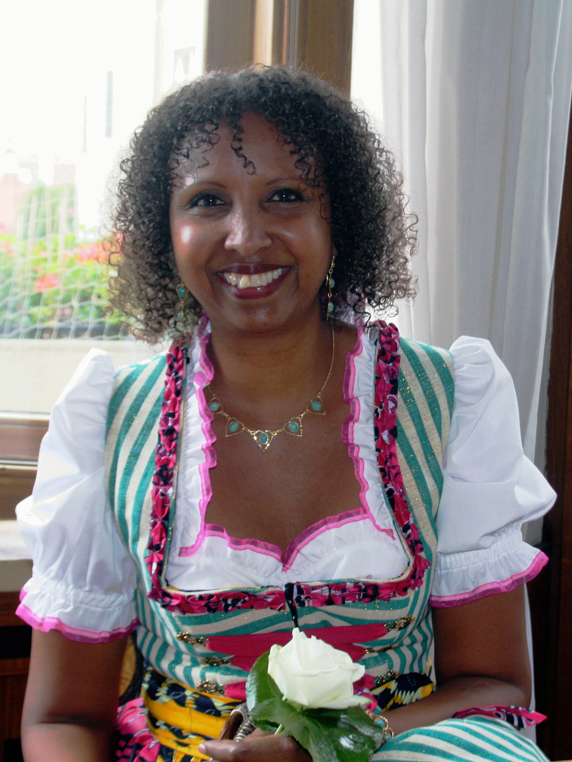 Fadumo Korn, bekannt durch Ihren Einsatz gegen die Beschneidung weiblicher Genitalien und durch ihre 2004 erschienene Autobiografie 'Geboren im großen Regen'